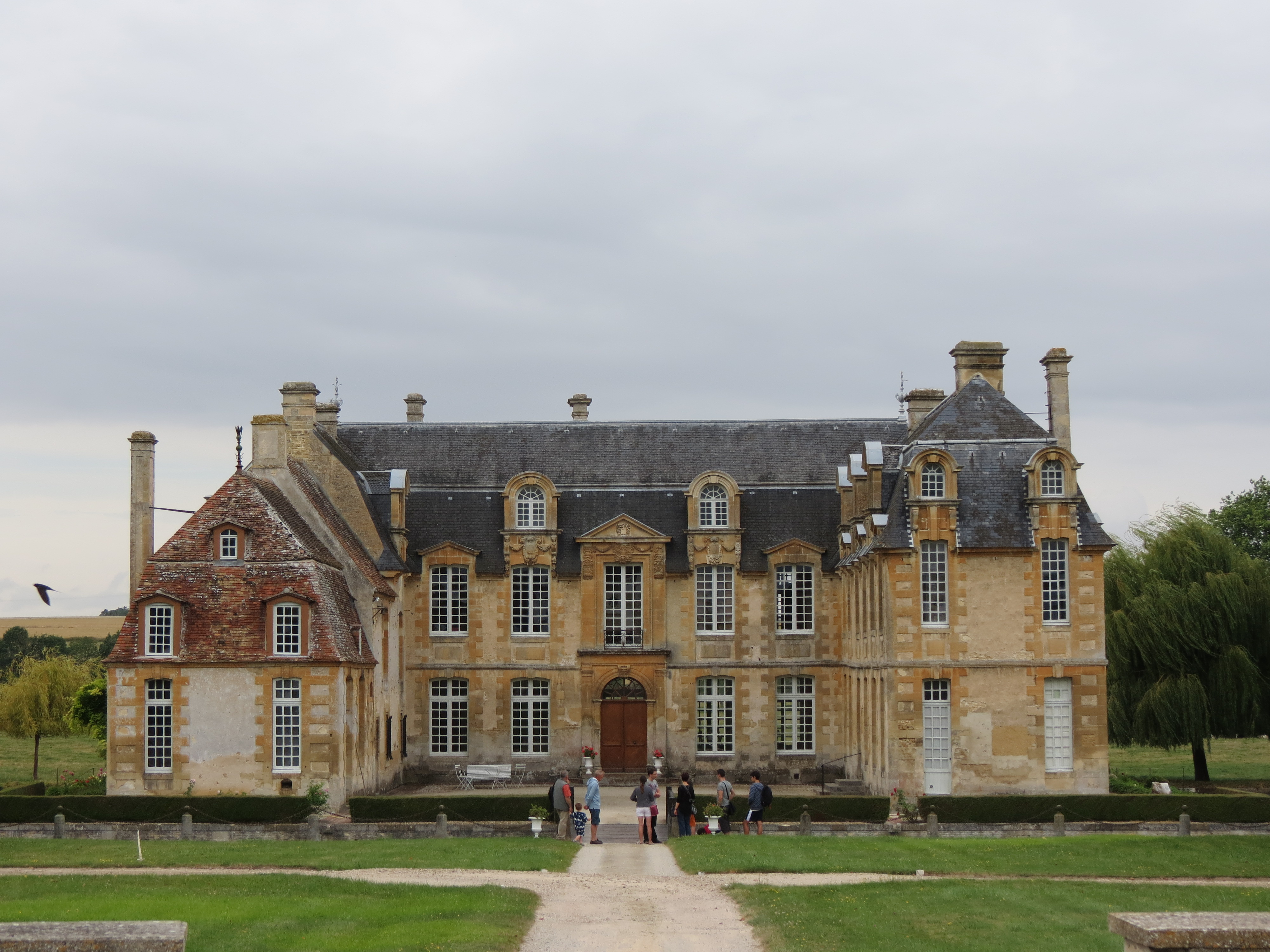 Château de Carel, vue depuis les douves.